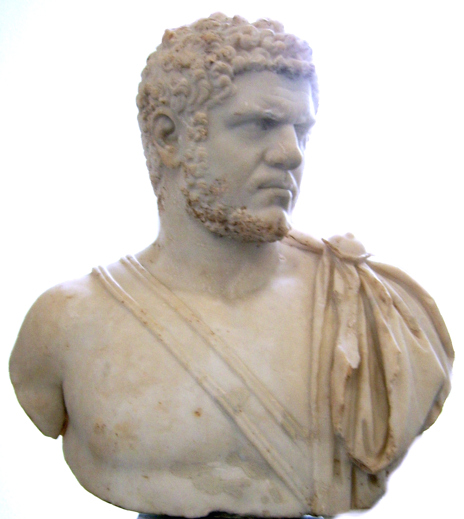 Busto dell'imperatore romano Caracalla. Pergamonmuseum, Berlino.